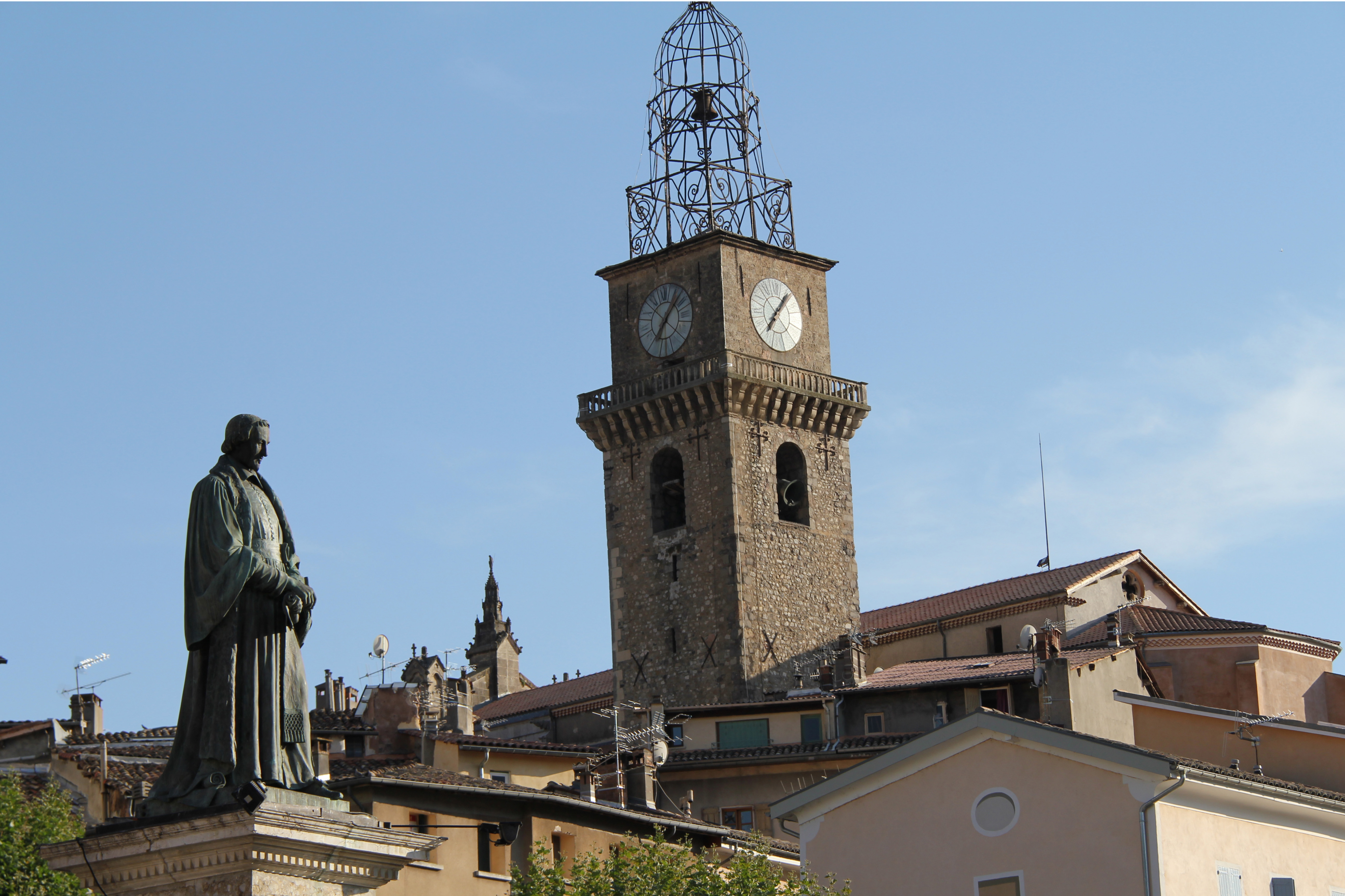 Statue de Gassendi sur la place de la cathédrale Saint-Jérôme de Digne